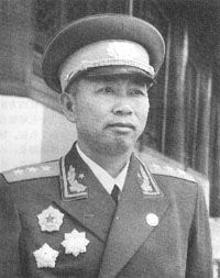 刘亚楼在1955年